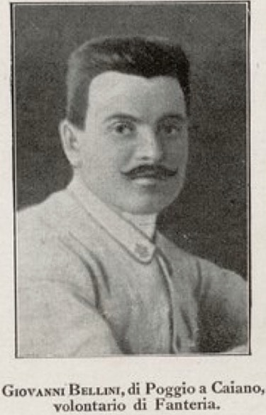 Giovanni Bellini (Poggio a Caiano, 1890 – Plava, 1915) poeta italiano.